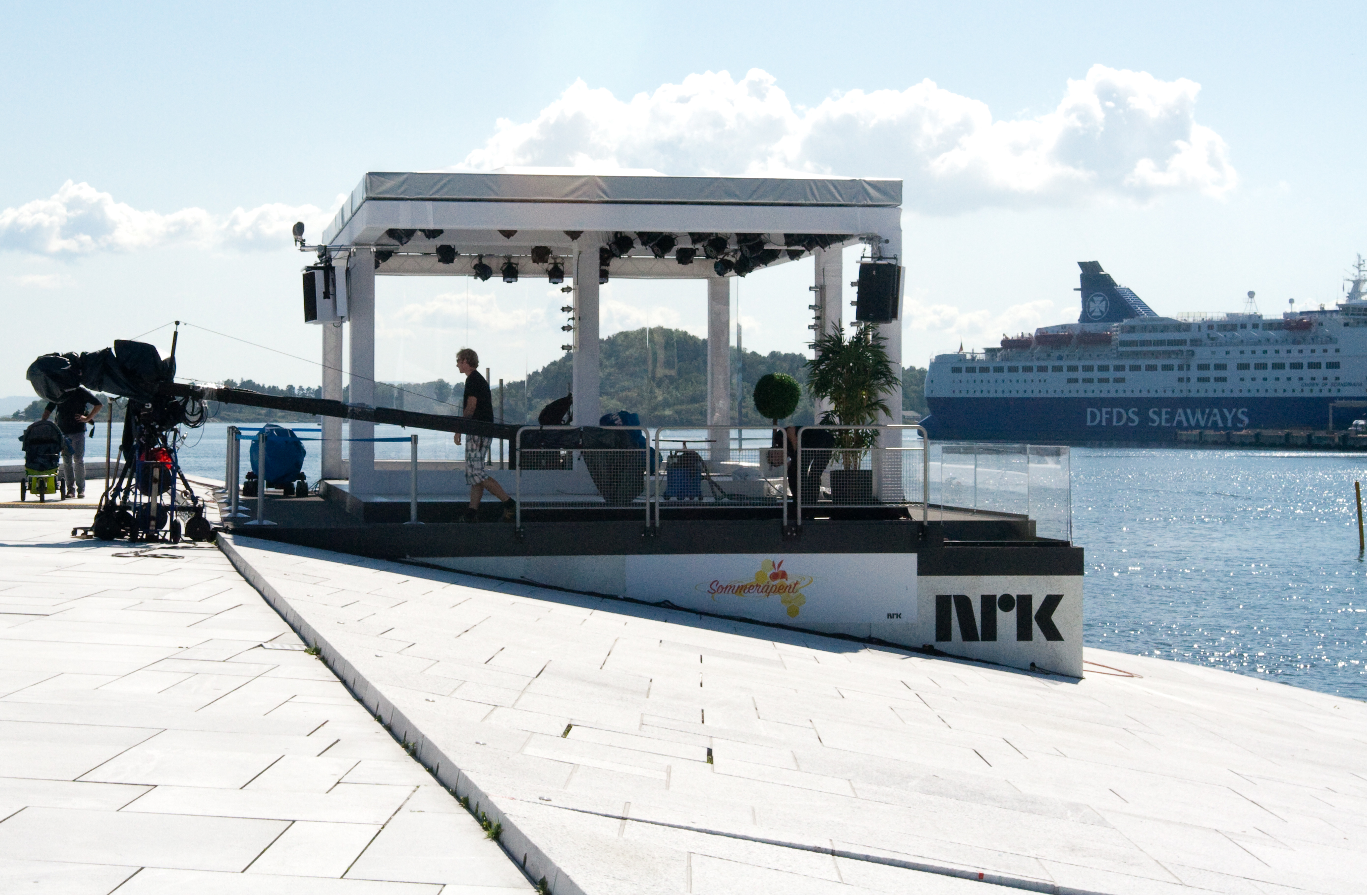 Sommeråpents studio på Operataket i 2011.